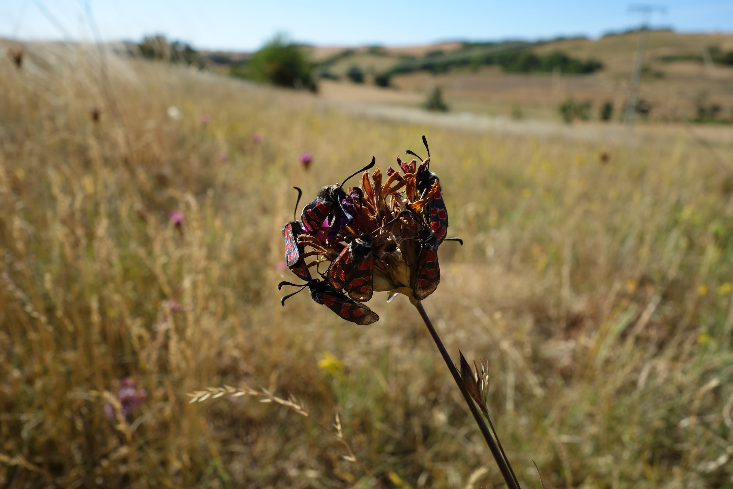 Sechs Esparsette-Widderchen (Zygaena carniolica) auf ihrer abendlichen Parkstation in der Nähe des Kyffhäuser (Großer Eller).